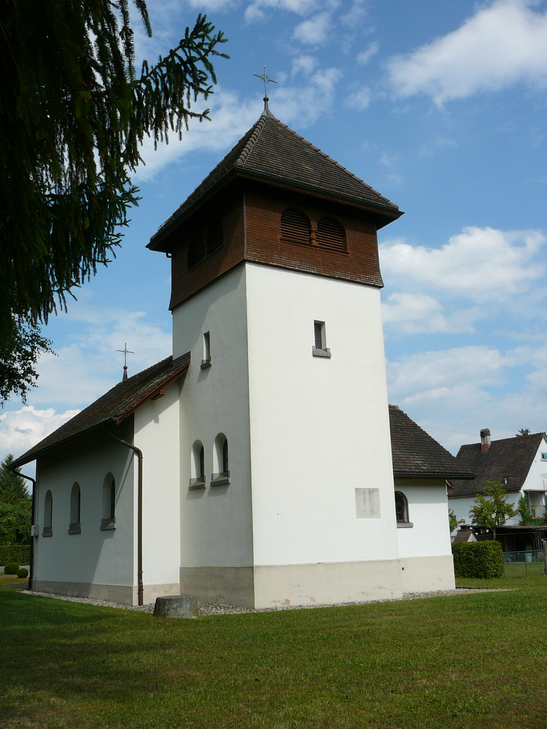 Römisch-katholische Kapelle St. Petrus Embrach, West